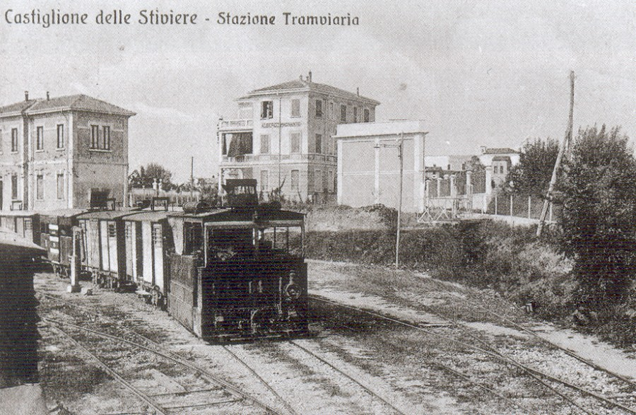 Convoglio merci composto da una locomotiva a vapore di tipo stradale Krauss e da quattro carri chiusi in partenza presso la stazione tranviaria di Castiglione delle Stiviere.